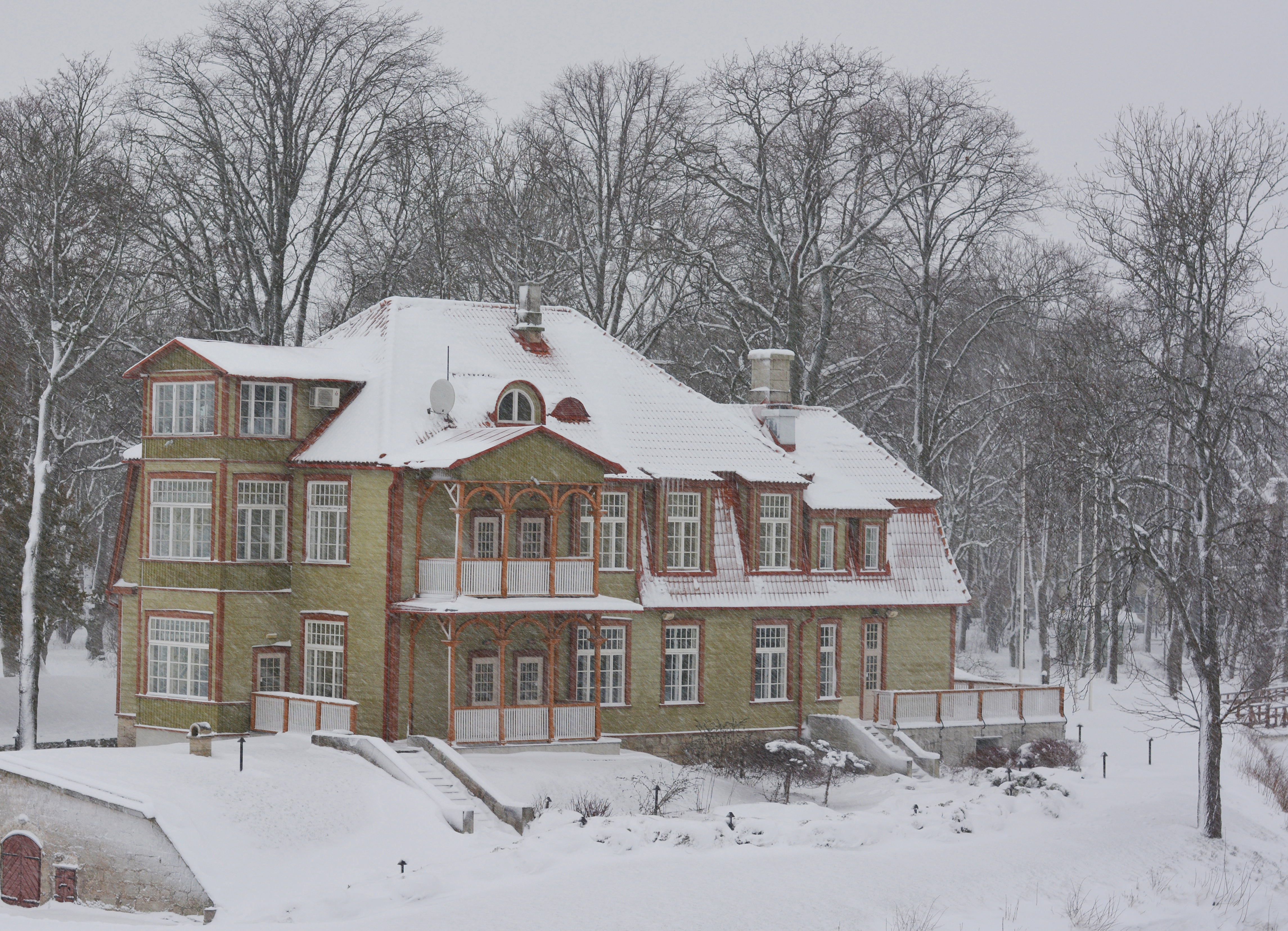 Lossi tänava maja number 27. Kaudsetel andmetel on teada, et maja Ekesparrede raveliinil valmis lõplikult 1908. aastal.